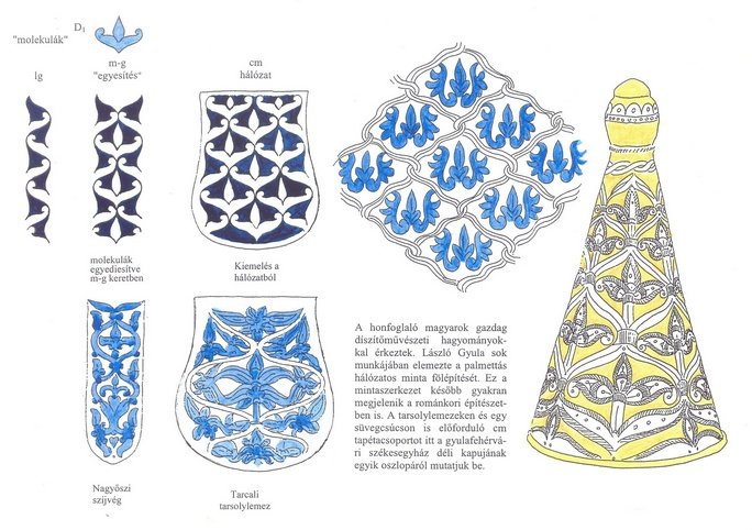 A honfoglaláskori palmettás díszítőművészet gazdag etnomatematikai kapcsolatokat mutat.